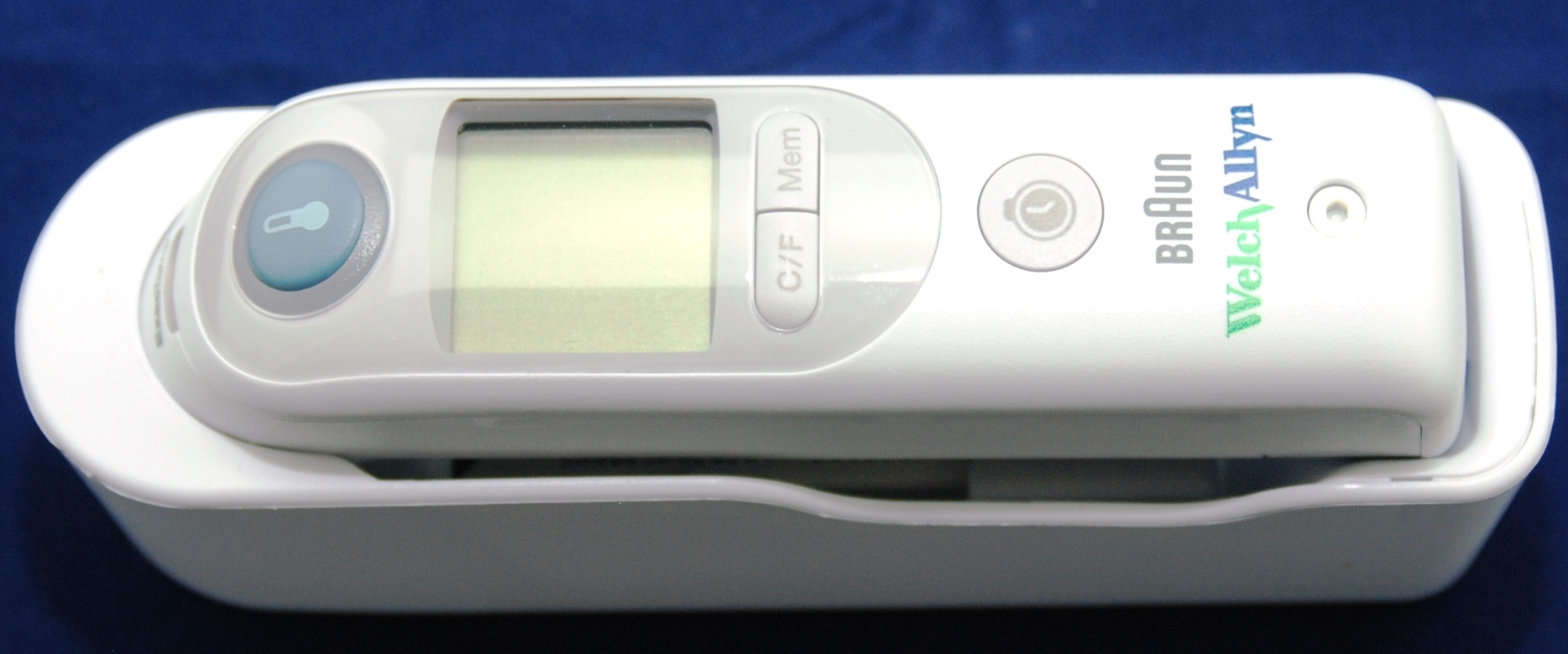 Ein Ohrtermometer für die Messung der Körpertemperatur. Auf dem Display wird das Ergebnis angezeigt. Gemessen wird die abgestrahlte Energie des Trommelfells. Dargestellt mit Ladestation.